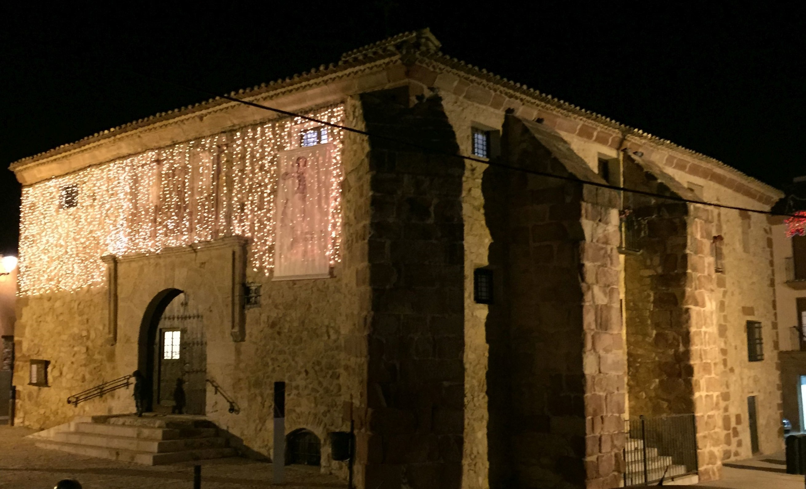 Estampa navideña del Pósito Municipal de Campo de Criptana